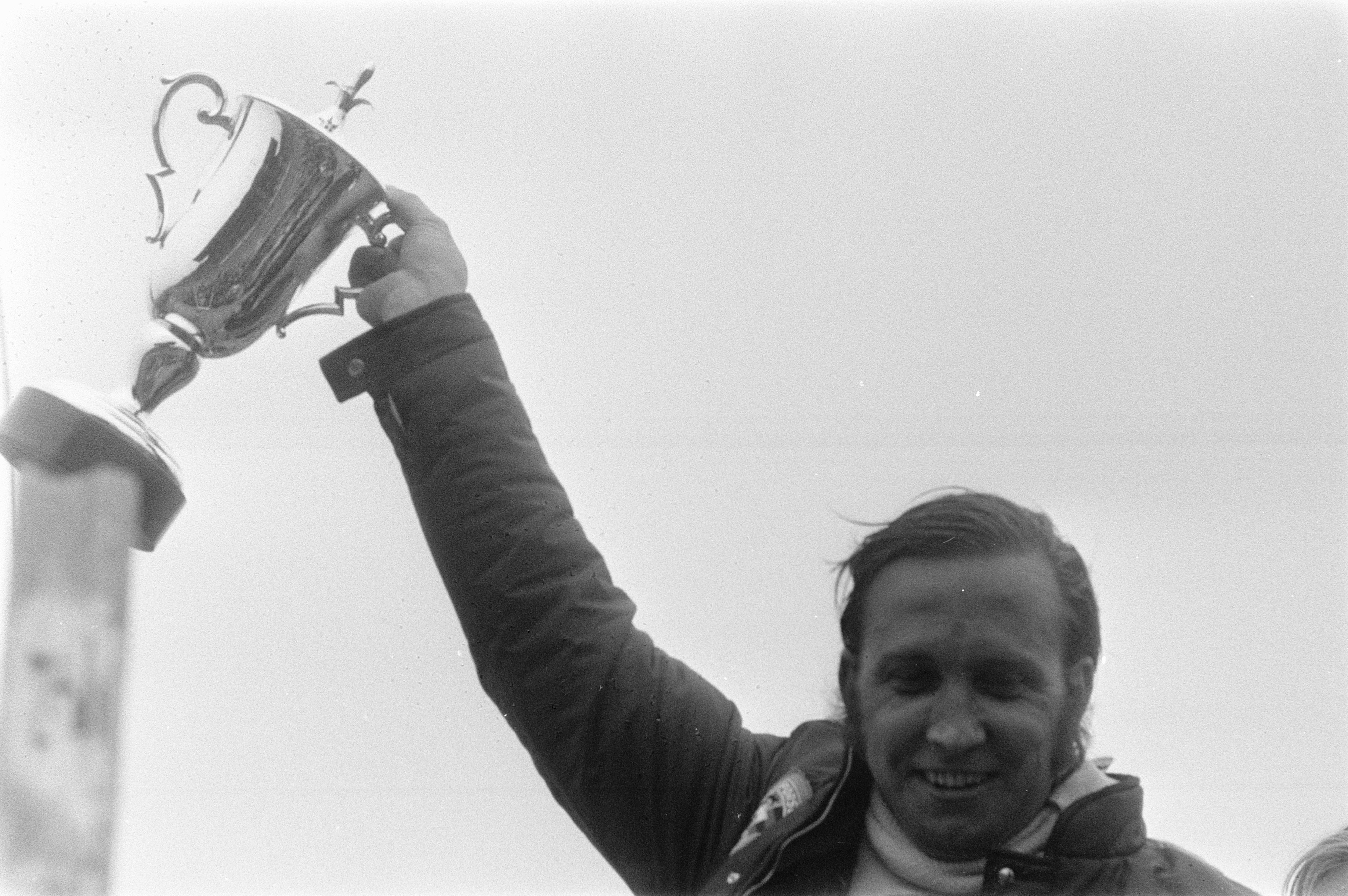 Collectie / Archief : Fotocollectie Anefo Reportage / Serie : Grote Prijs voor autorace 1972 op het circuit van Zandvoort Beschrijving : De winnaar met de beker (naam onbekend) Datum : 18 juni 1972 Locatie : Noord-Holland, Zandvoort Trefwoorden : autosport, circuits, races Fotograaf : Fotograaf Onbekend / Anefo Auteursrechthebbende : Nationaal Archief Materiaalsoort : Negatief (zwart/wit) Nummer archiefinventaris : bekijk toegang 2.24.01.05 Bestanddeelnummer : 925-6771 Reacties Geplaatst door Luc Ghys op 12 september 2016 - 20:22. Dit is Jürgen Neuhaus. Geplaatst door Luc Ghys op 22 oktober 2016 - 10:58. Dit is de Duitser Jürgen Neuhaus.